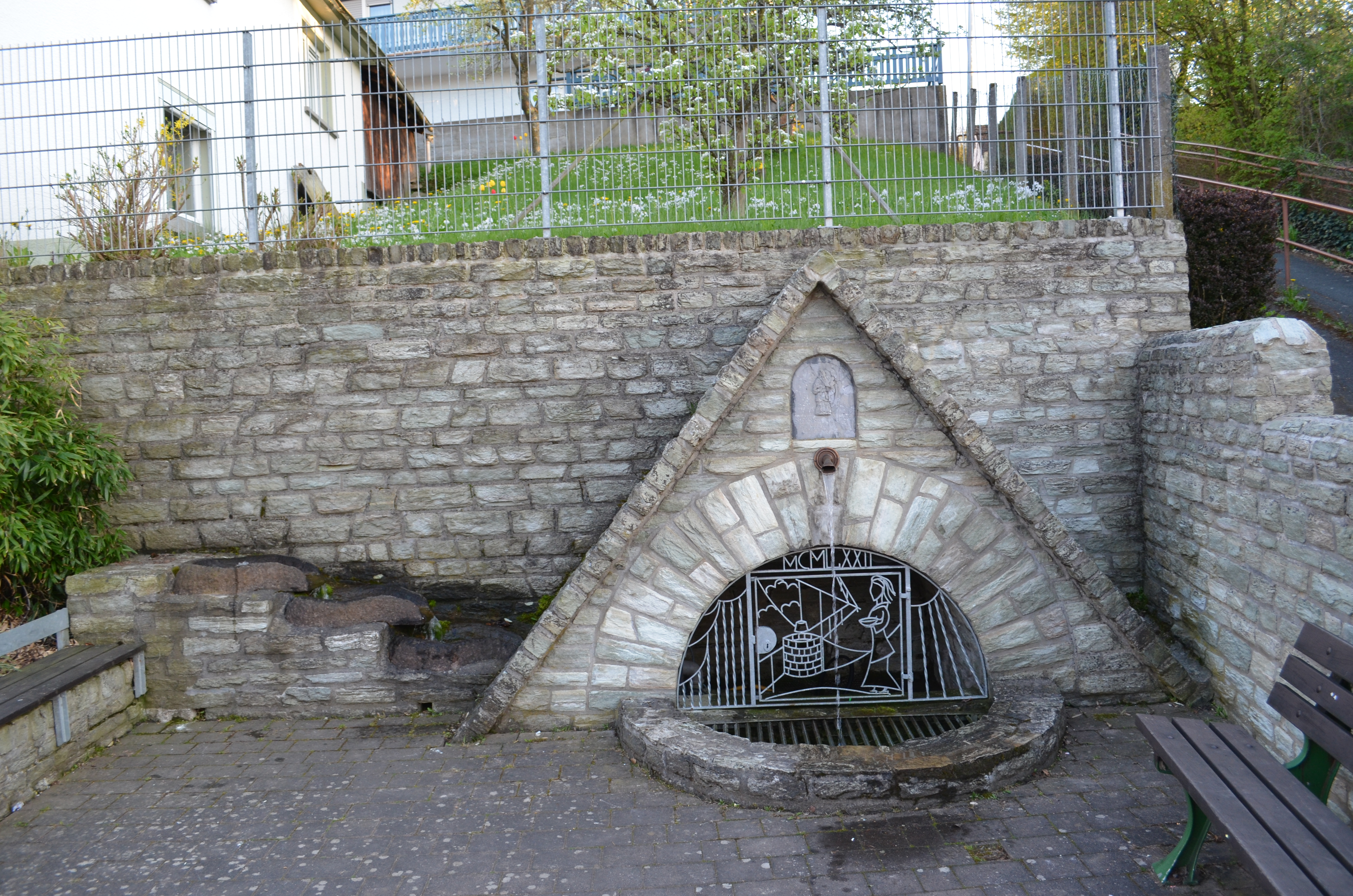 Haintchen, Freier Platz, Brunnen